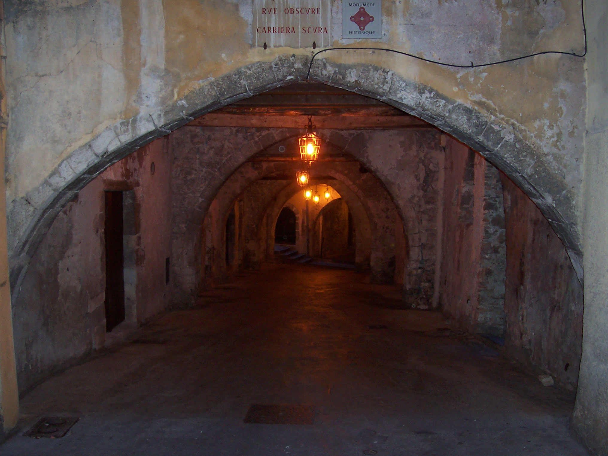 Rue Obscure, Villefranche-sur-Mer, Alpes-Maritimes, france